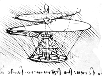 l'helicoptère de Leonard de Vinci